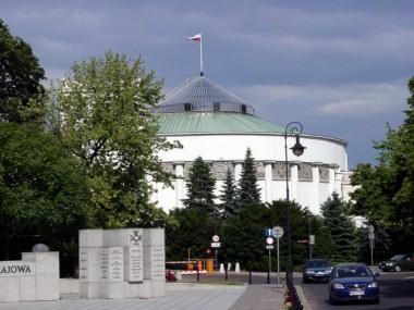 Sejm in Poland